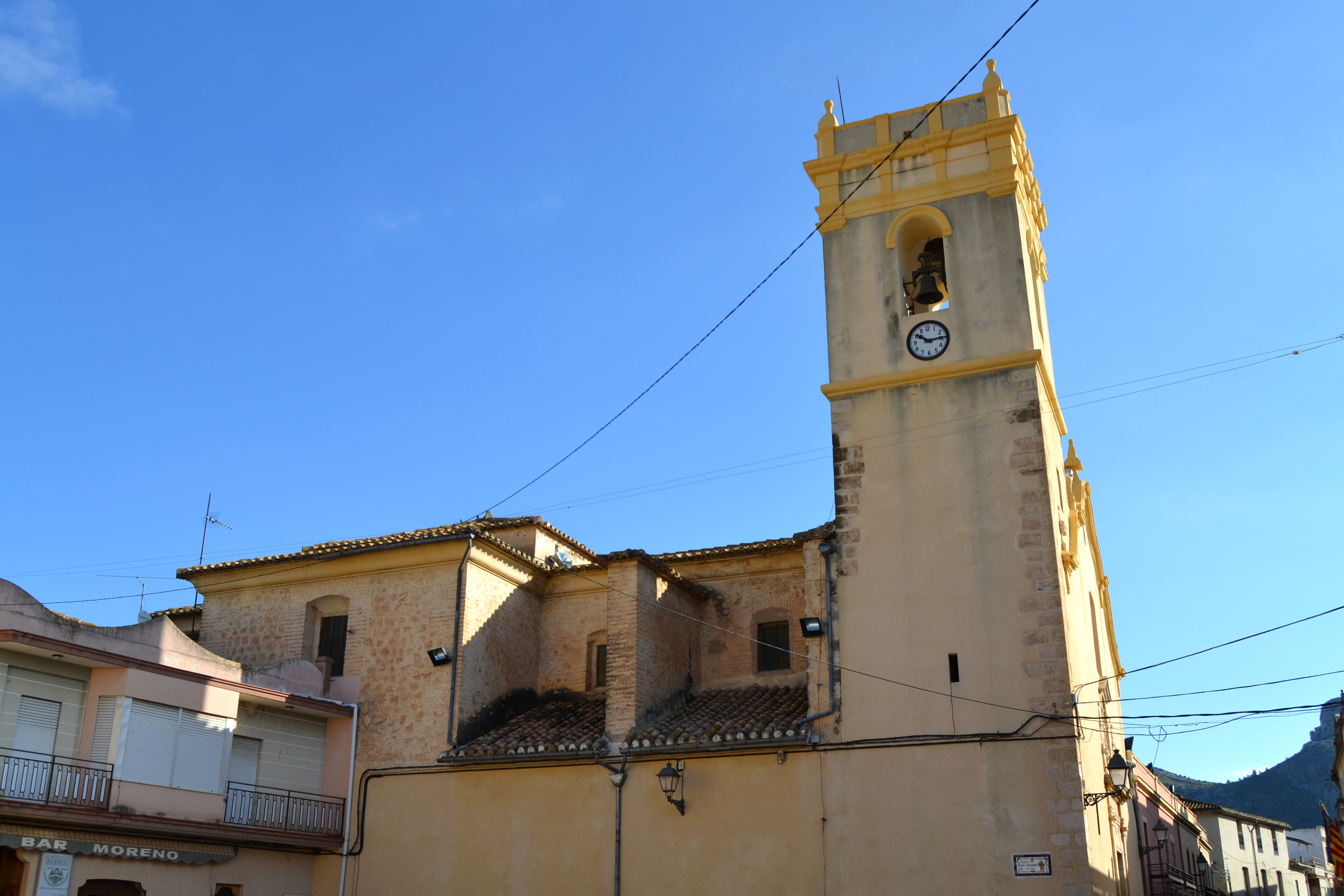 Església de Sant Francesc de Paula del Ràfol d'Almúnia.